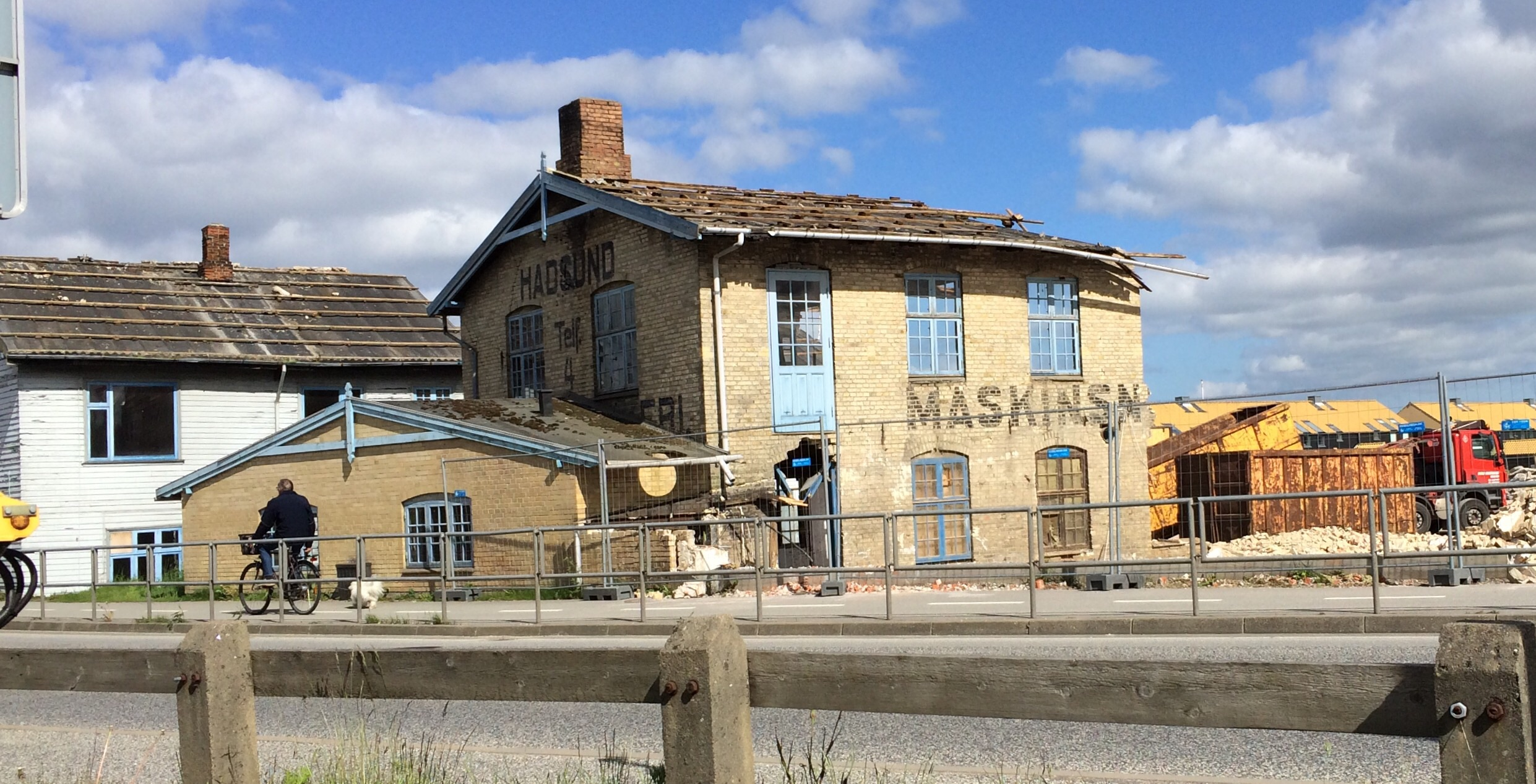 Maskinsnedkeriet 26. maj 2015